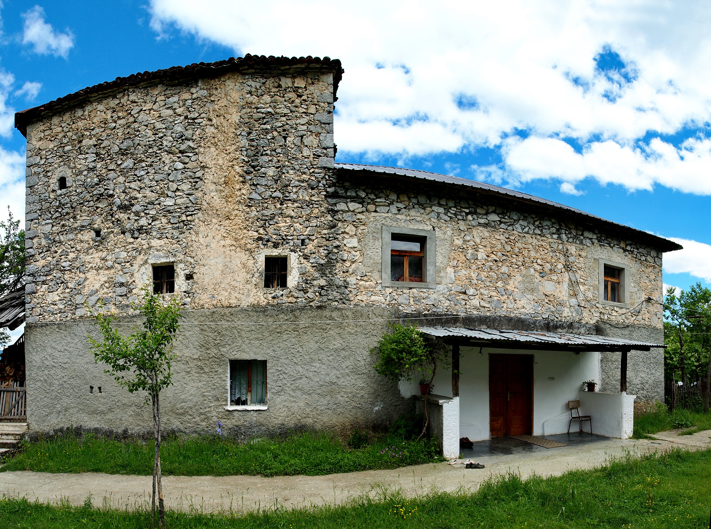 Kullë guri - Familja Mekshiçi - Fshati Margegaj